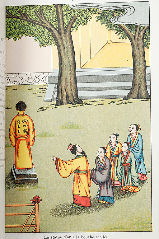 A Recherches sur les superstitions en Chine című könyv egyik illusztrációja